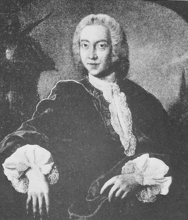 Philipp Heinrich II. (Freiherr) von Stenglin, * Hamburg 11. Januar 1718, † Plüschow/Mecklenburg 17. Oktober 1793, Bankier und königlich-dänischer Kammerherr, Reichsfreiherrenstand Wien 22. März 1759, dänische Adelsnaturalisation 1. Februar 1765